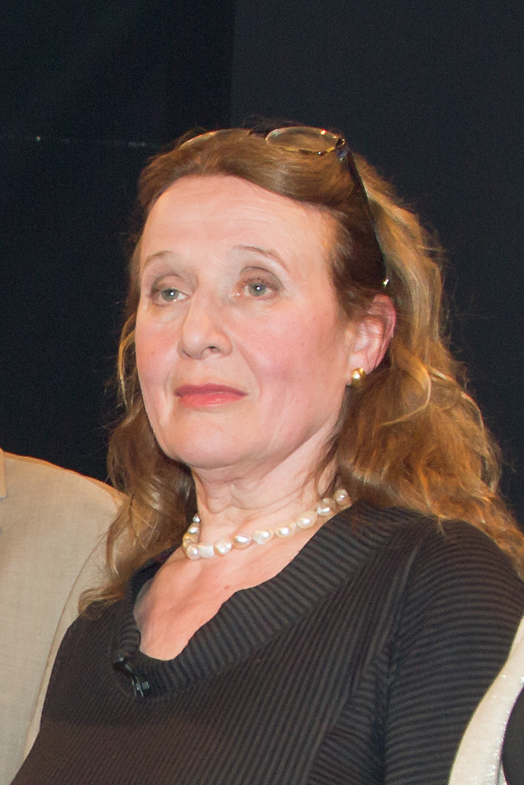 WDR-Sendung "Ich stelle mich", Aufzeichnung am 13.06.2015 mit Gregor Gysi im Boklemünd. Das Bild zeigt: Gabriele Gysi